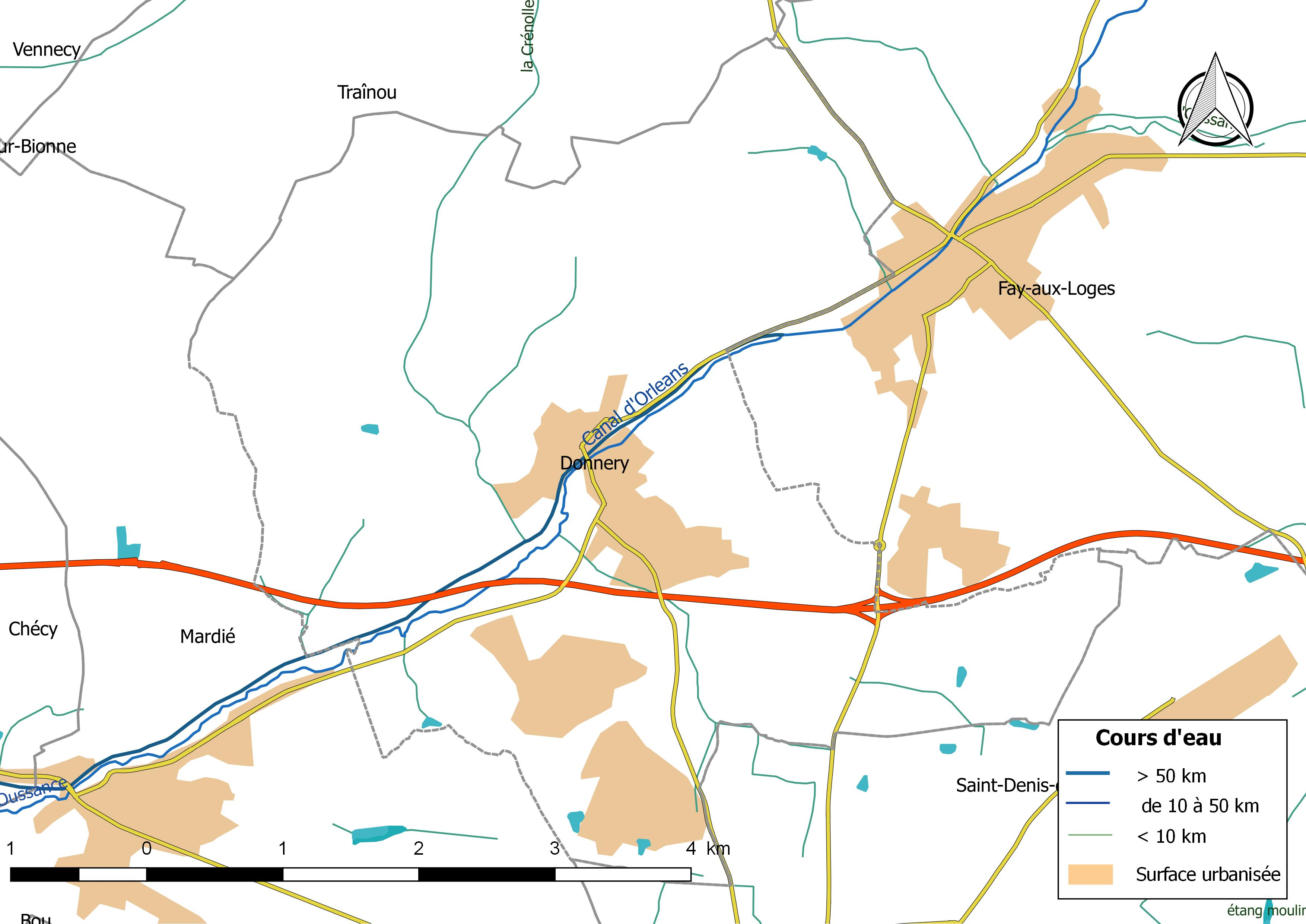 Carte du réseau hydrographique de la commune de Donnery (France).